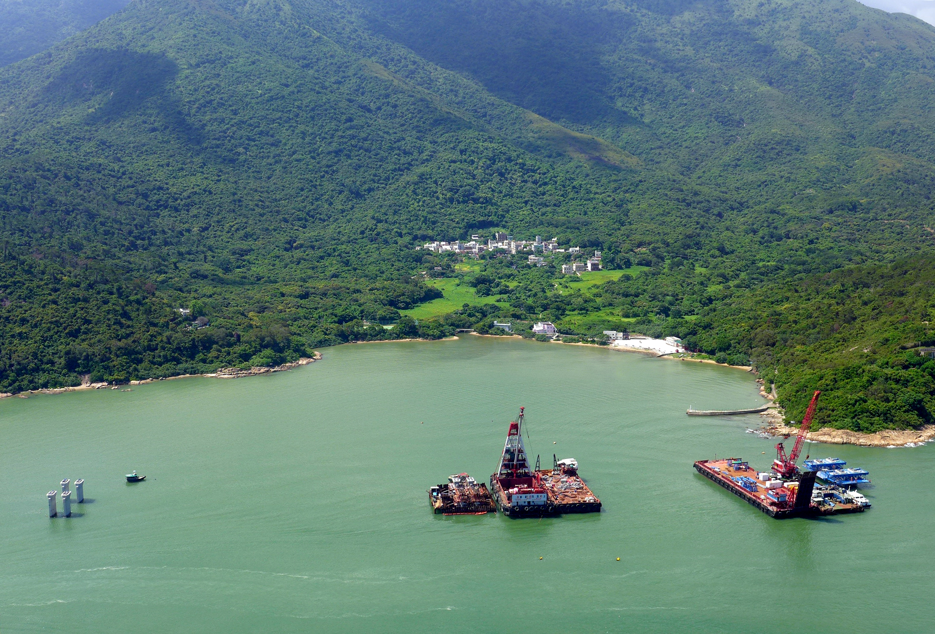 Sha Lo Wan